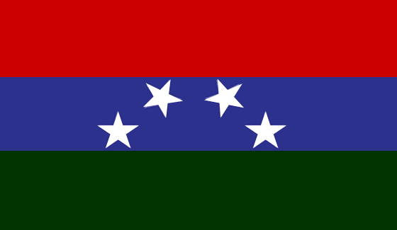 Bandera del municipio Pedraza, estado Barinas, Venezuela